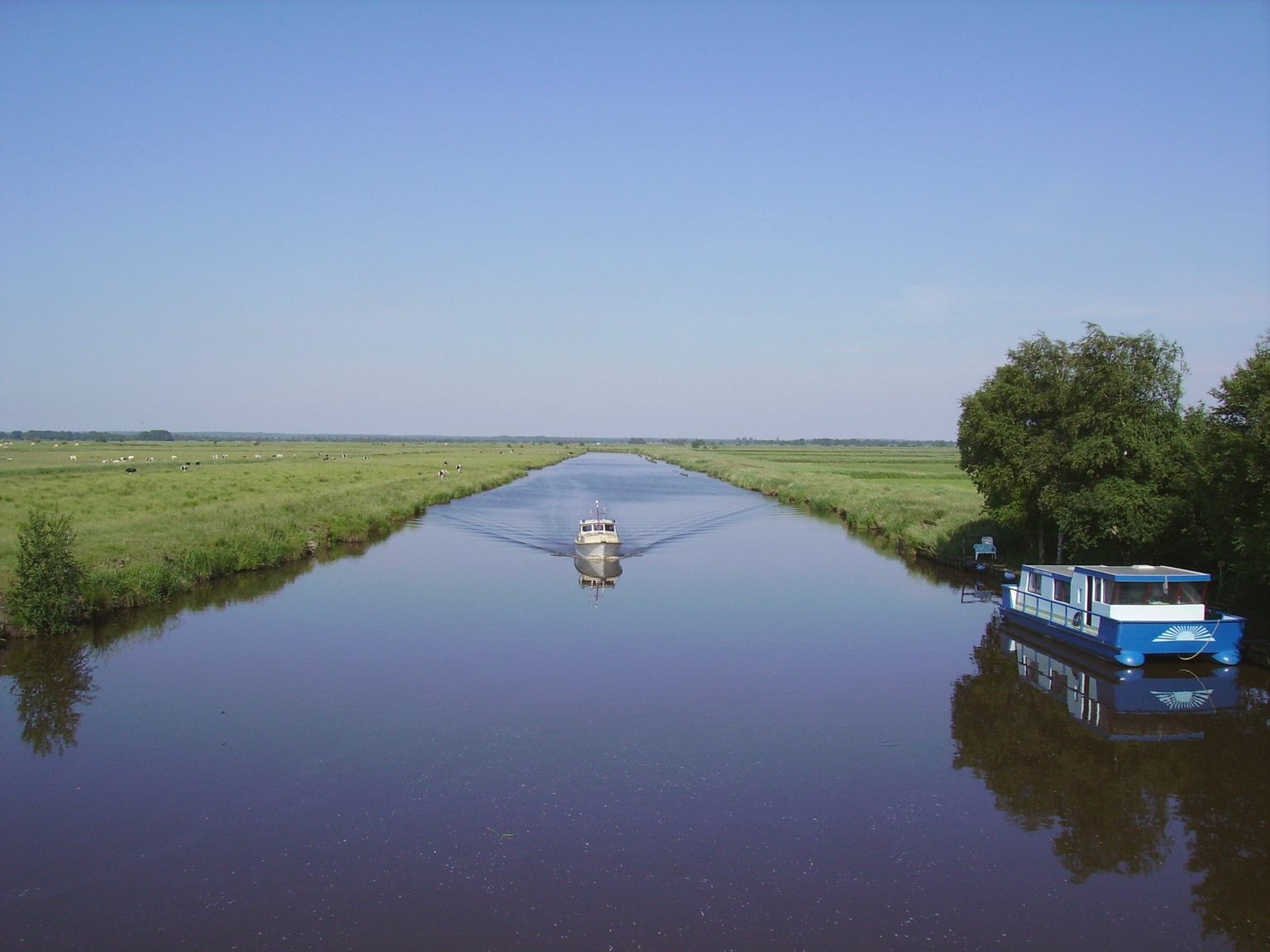 Blick von der Schiffdorfer Schleuse Richtung Osten auf die Geeste